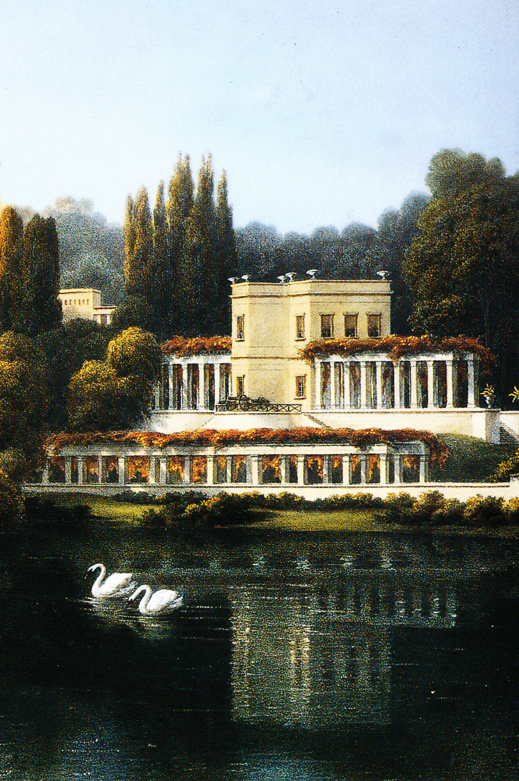 Haun nach Schirmer, das Casino in Glienicke, Lithografie um 1840 (Ausschnitt)